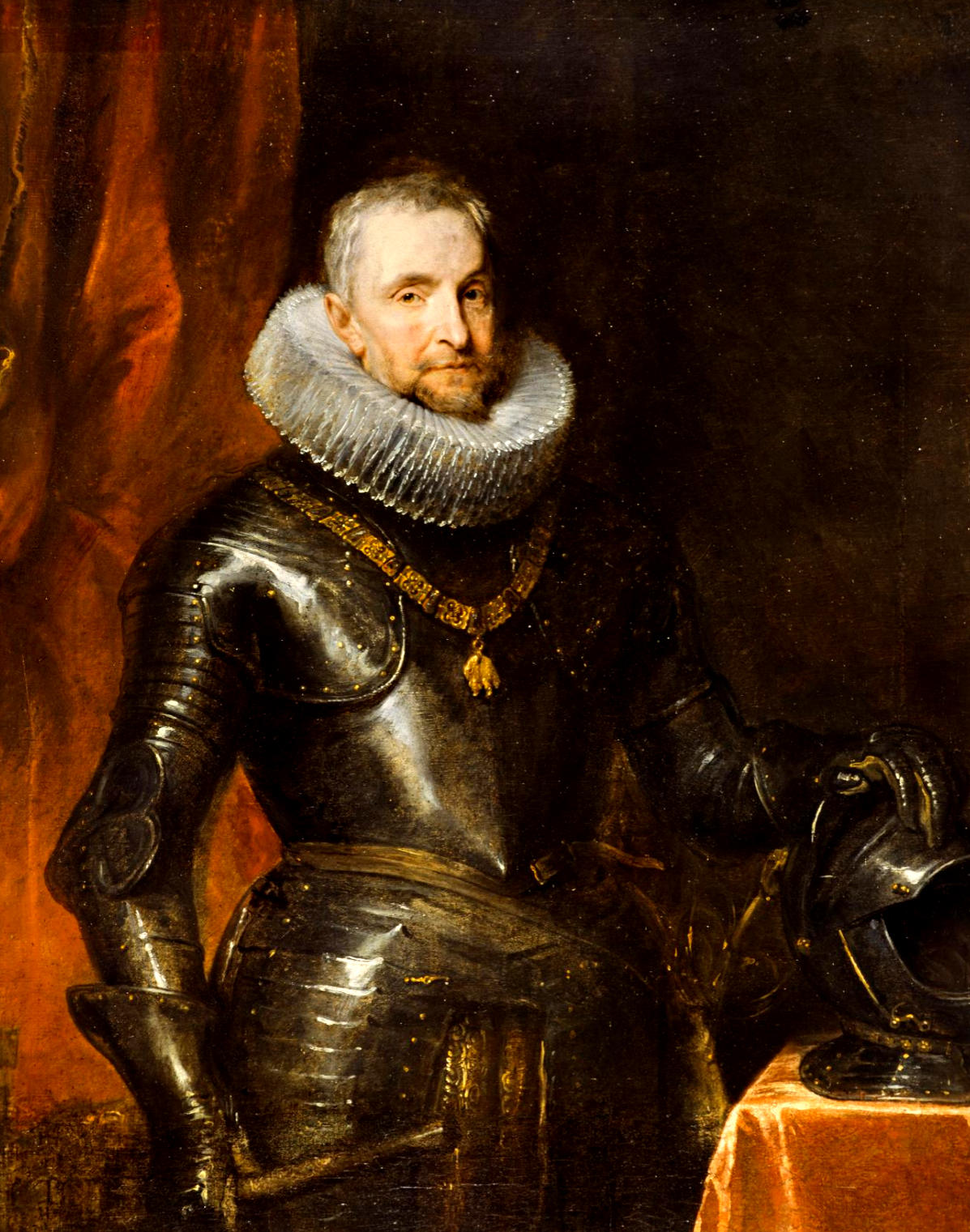 Ritratto di Ambrogio Spinola